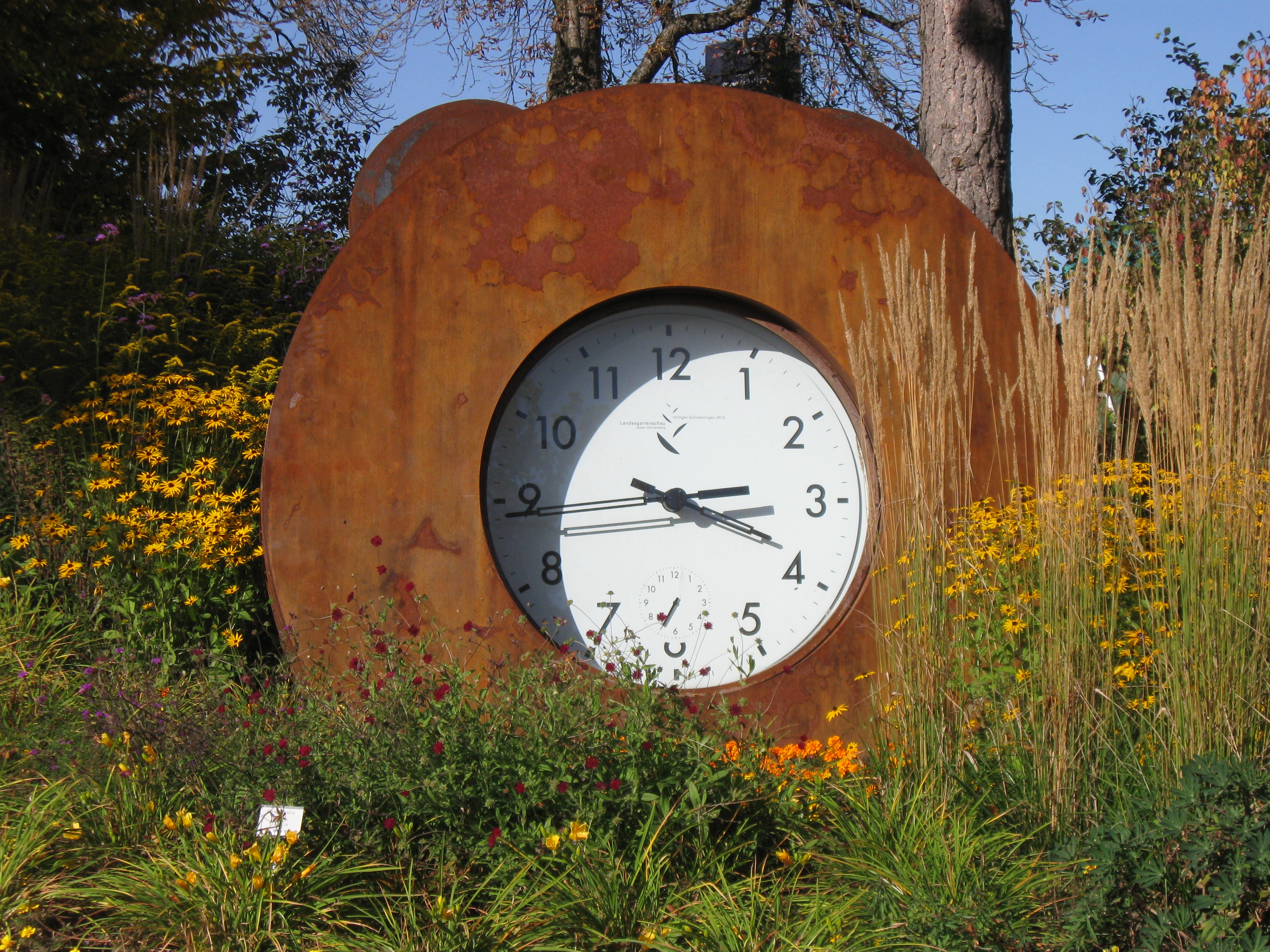 Wecker (2 Meter groß) auf der LGS 2010 in VS